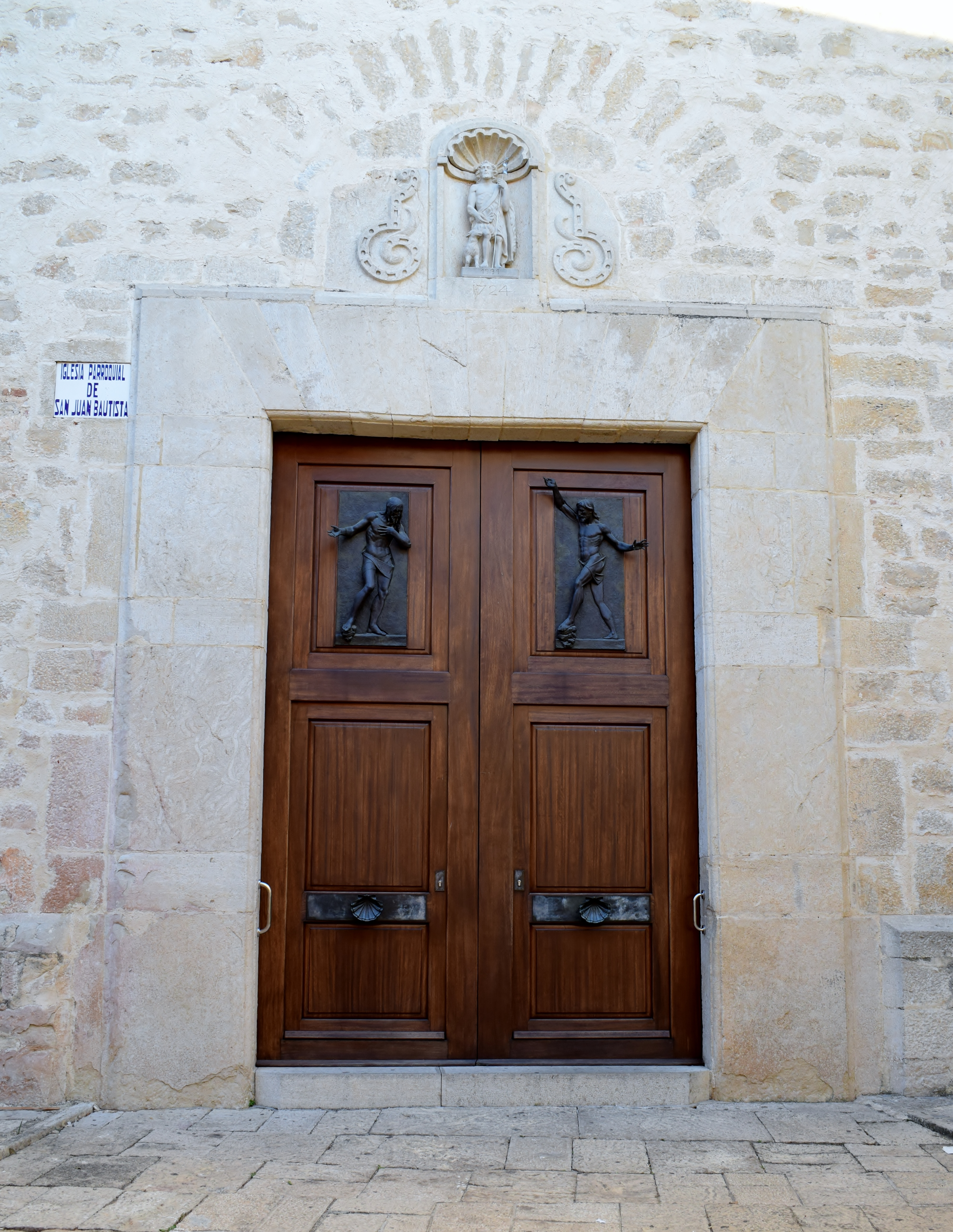 Atzeneta d'Albaida.